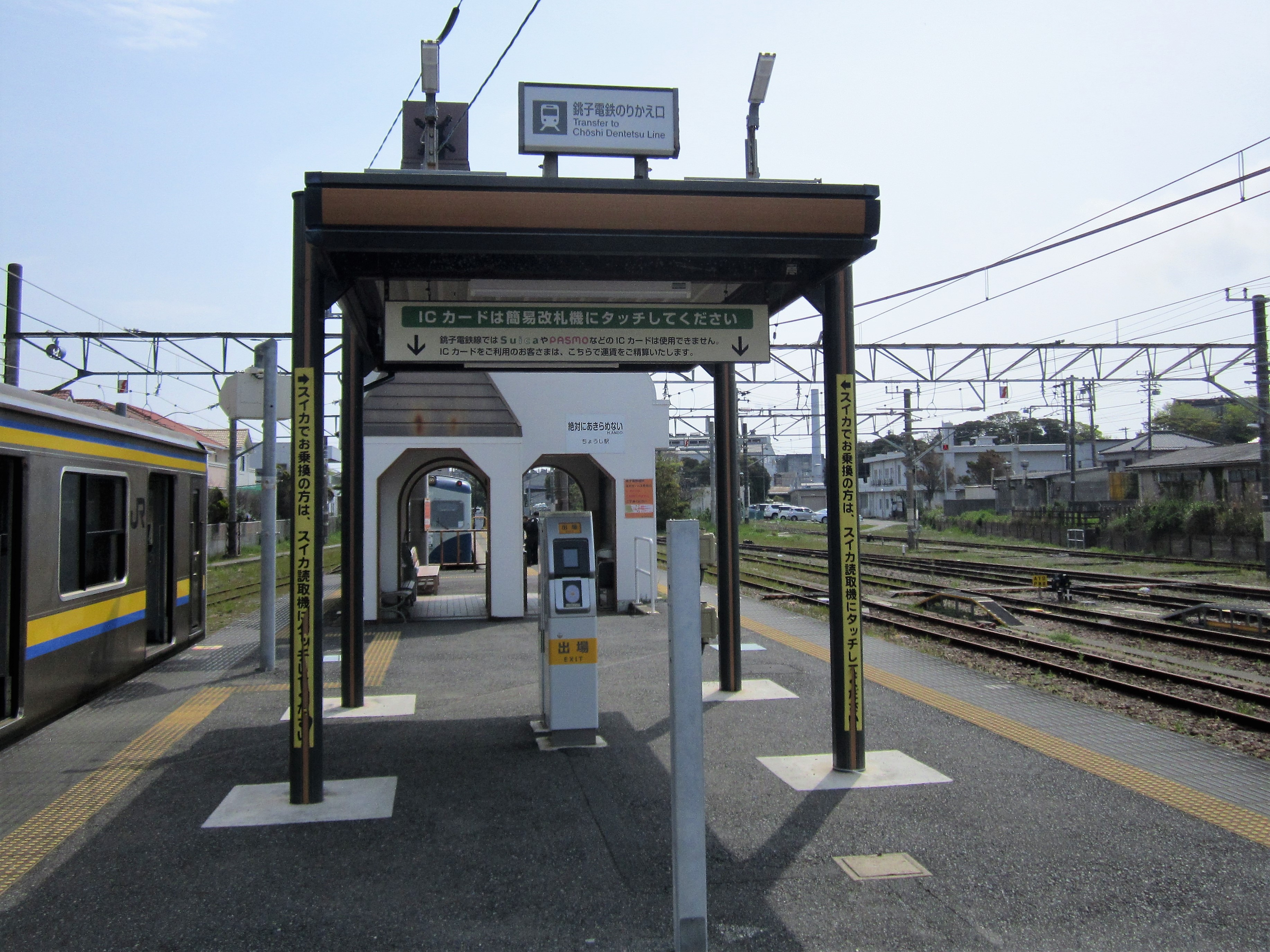 銚子駅・銚子電鉄乗換口 Canon PowerShot A2200